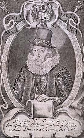 Francis Bacon Frontispiz aus Sylva sylvarum: or a Naturall Historie. In ten centuries ... von William Rawley.